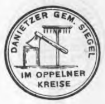 Altes Siegel bzw. Stempel der Gemeinde Danietz im Kreis Oppeln.